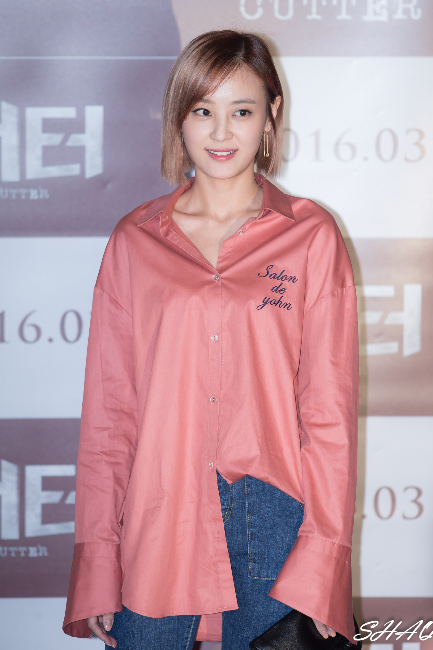 160329 영화 커터 VIP 시사회 - 강별